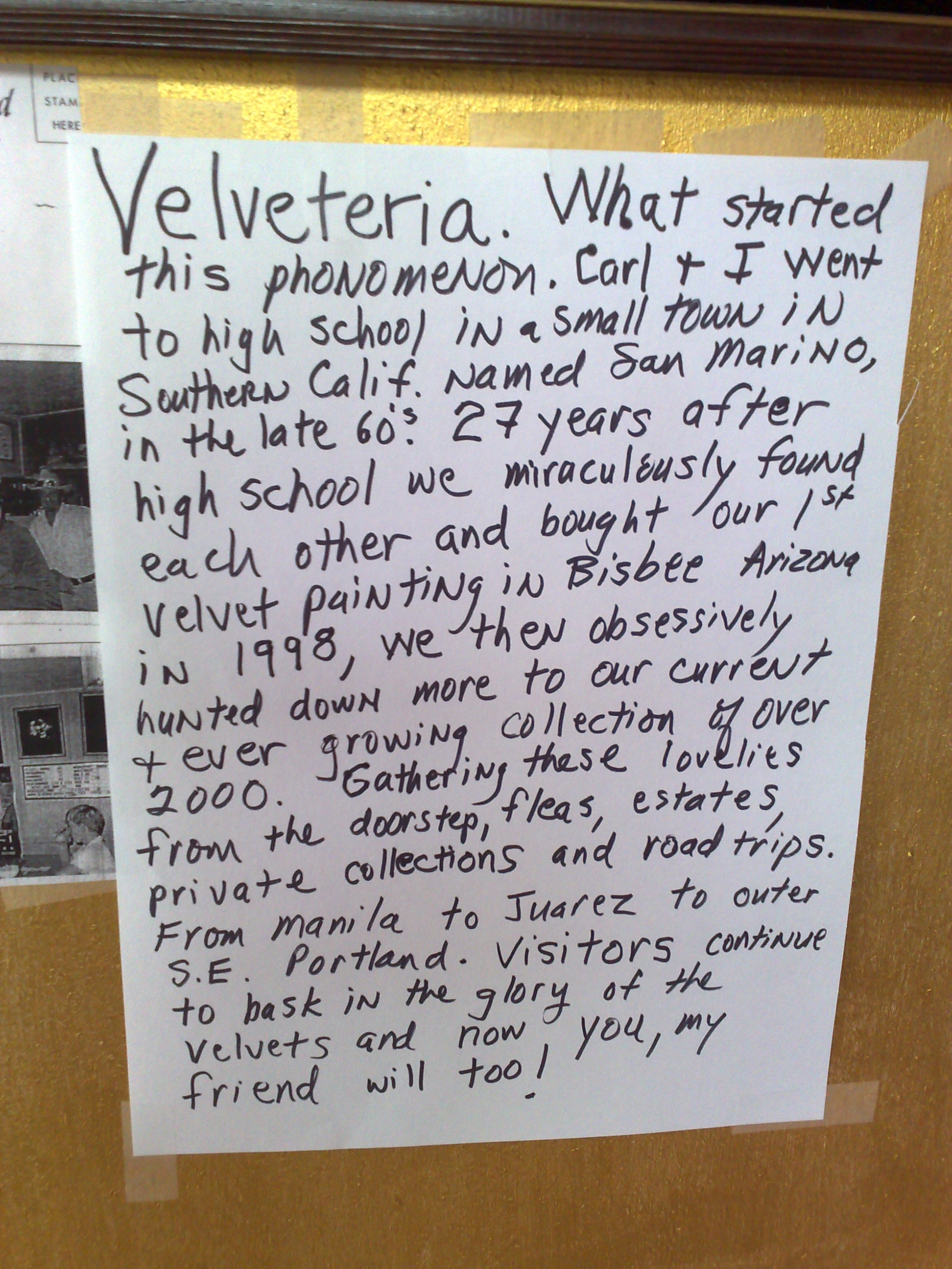 Velveteria, Portland, Oregon